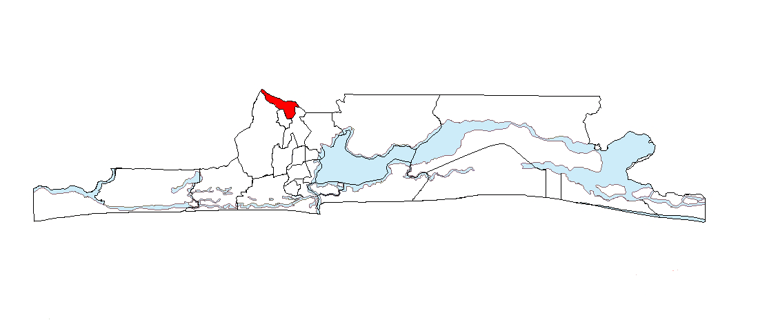 Ubicación de Ifako Ijaye en el Estado de Lagos